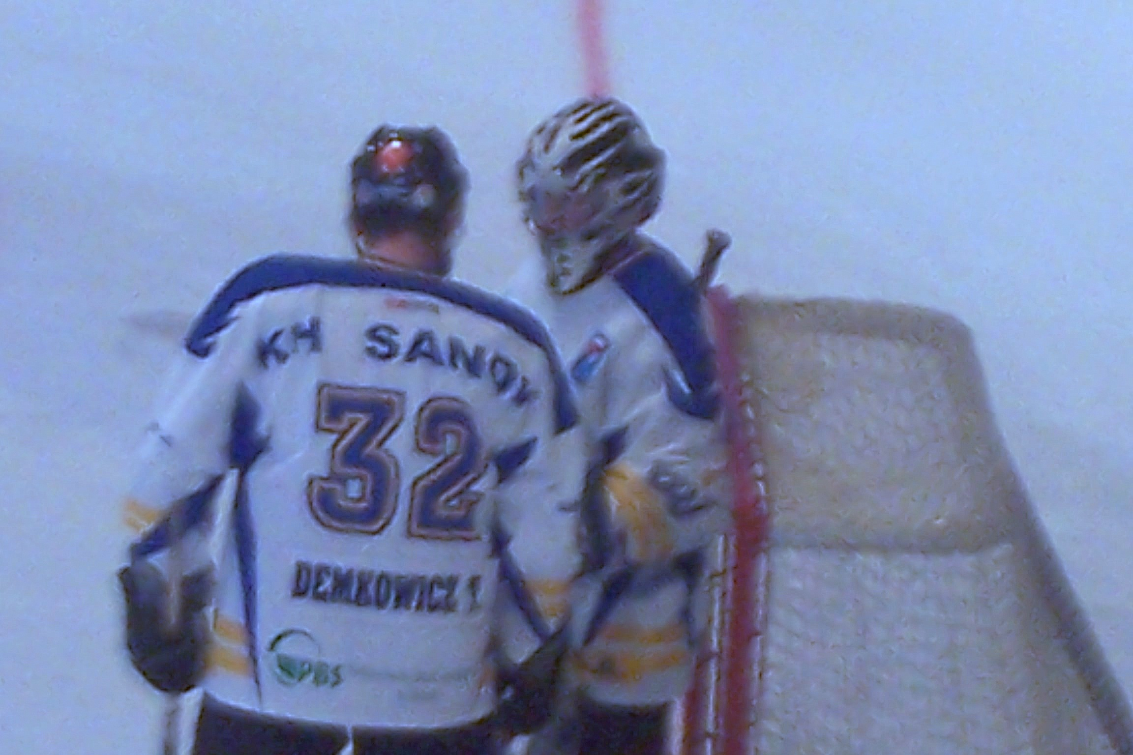 KH Sanok - Stoczniowcem Gdańsk (6:2) mecz 21 marca 2006 jako ostatnie oficjalne spotkanie hokeja na lodzie na lodowisku Torsan.